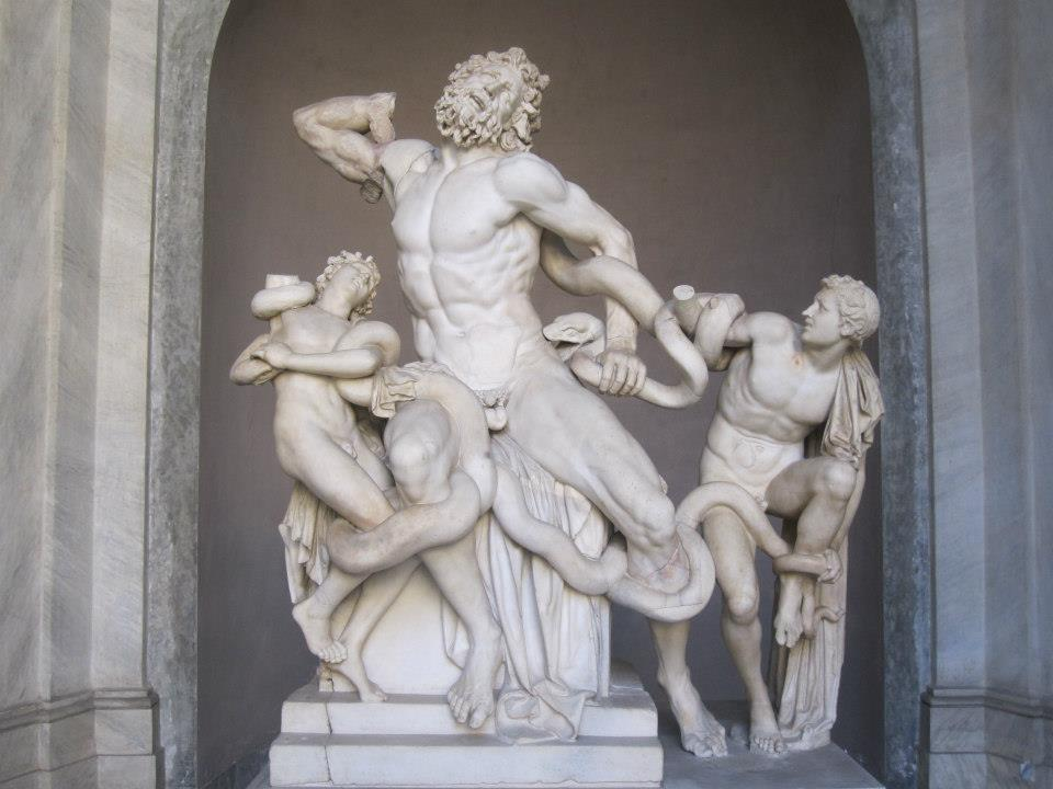 Der Priester Laokoon warnte die Trojaner vor dem hölzernen Pferd und wurde dafür, zusammen mit seinen beiden Söhnen, getötet.